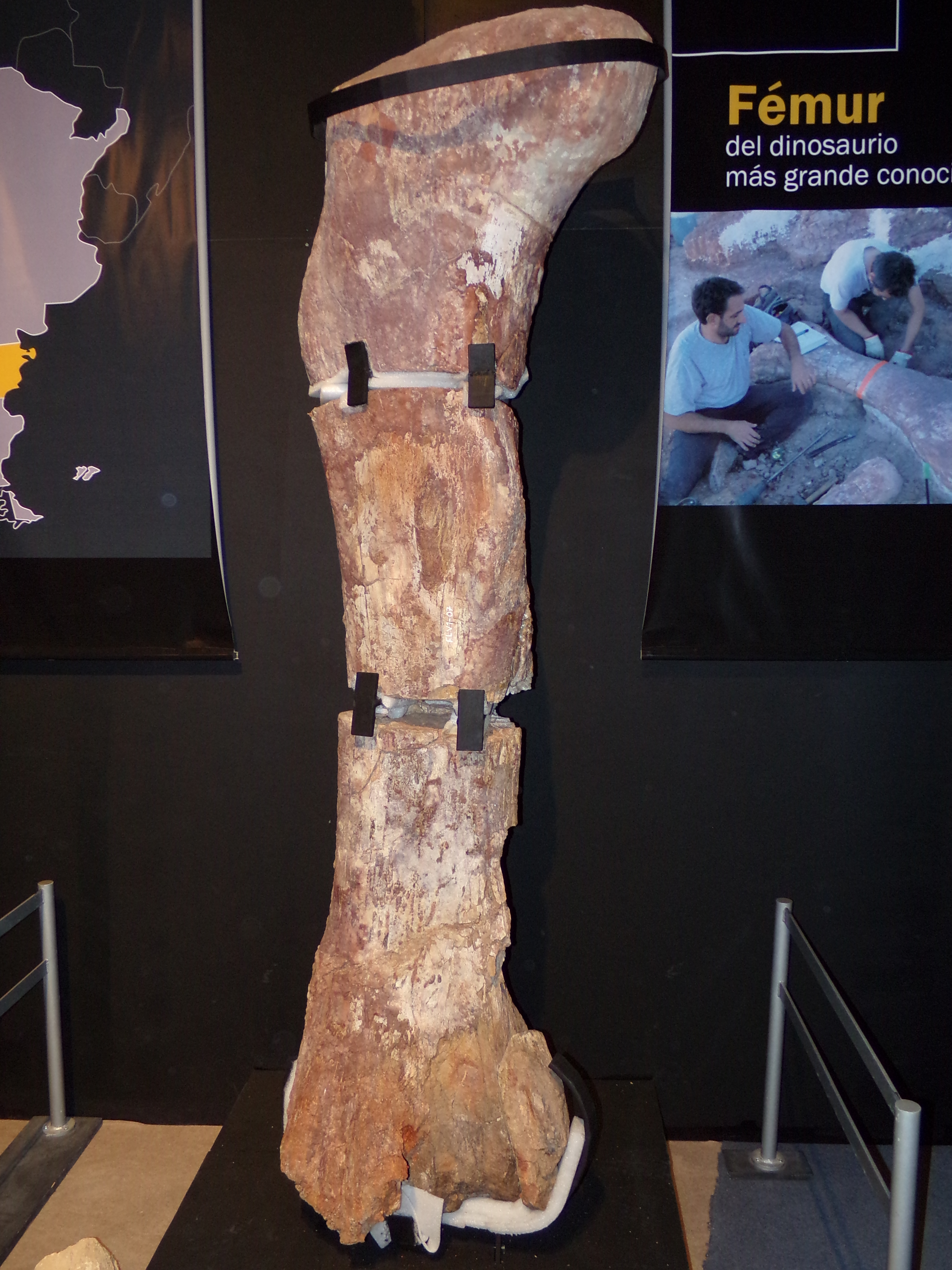 Fémur del Titanosauria del Chubut, MEF Trelew, junio de 2015.